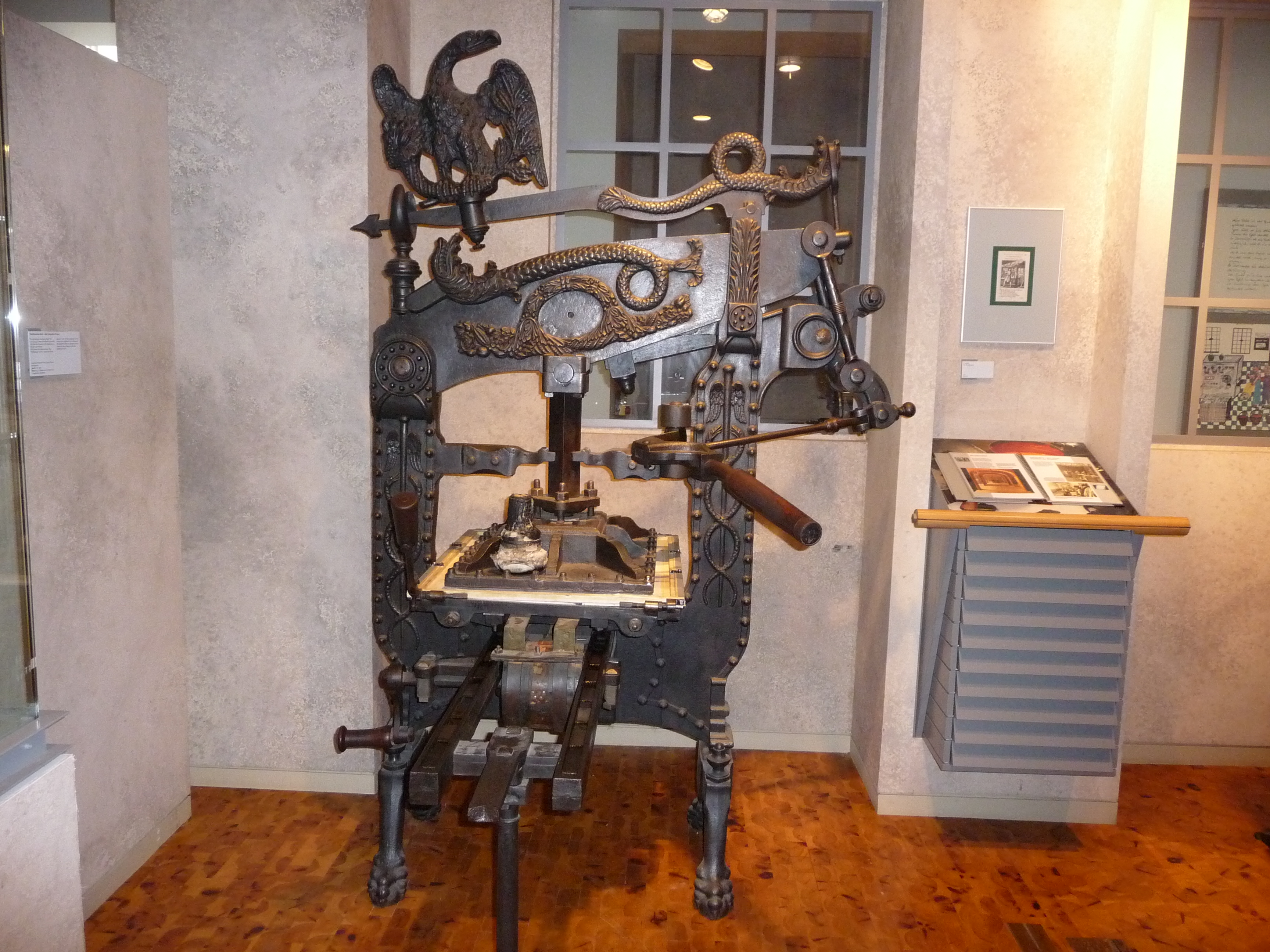 Columbia Druckpresse Ausstellungsstück der DASA in Dortmund, Entworfen 1817 von George Clymer, Baujahr der Presse etwa 1820, zur Bedienung der Presse waren zwei Drucker nötig